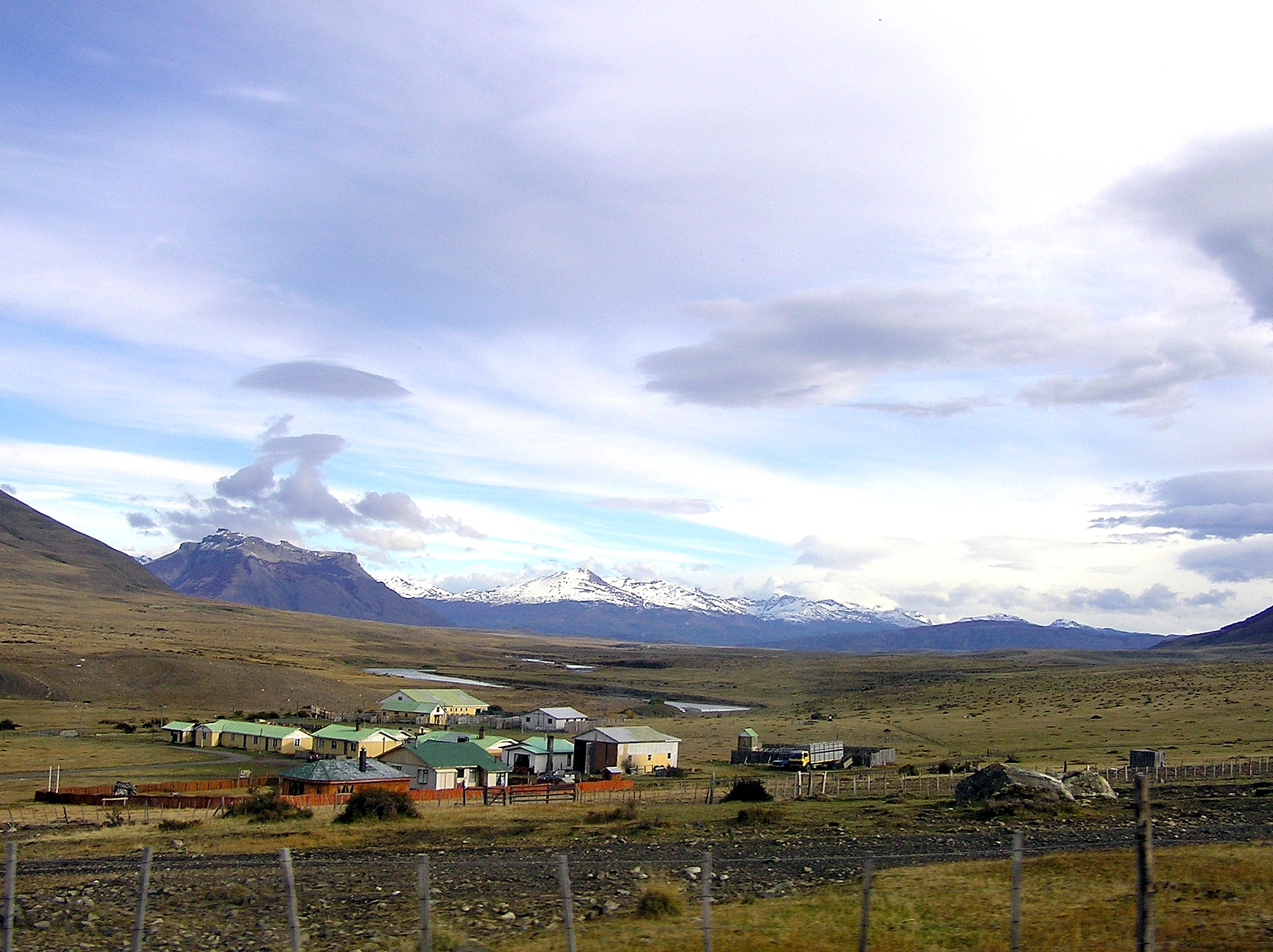 Cerro Castillo, Pto Natales, camino a Parque Torres del Paine